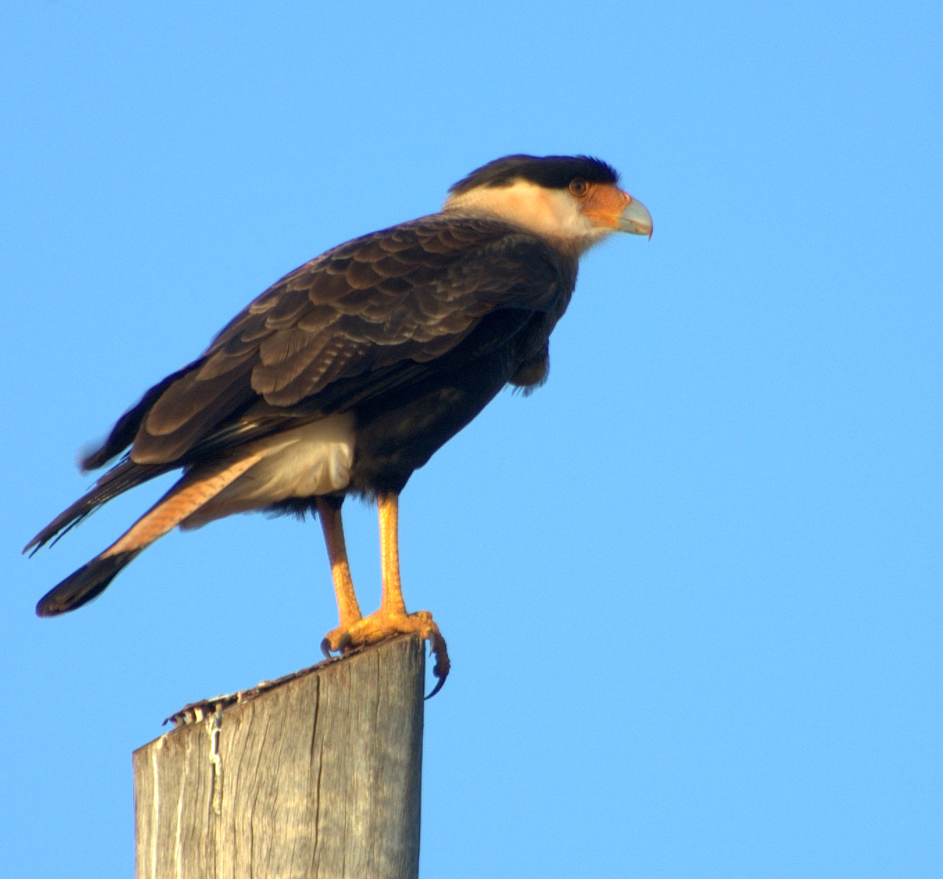 Rodovia João Mellão, SP 255, próximo à cidade de Jaú-SP